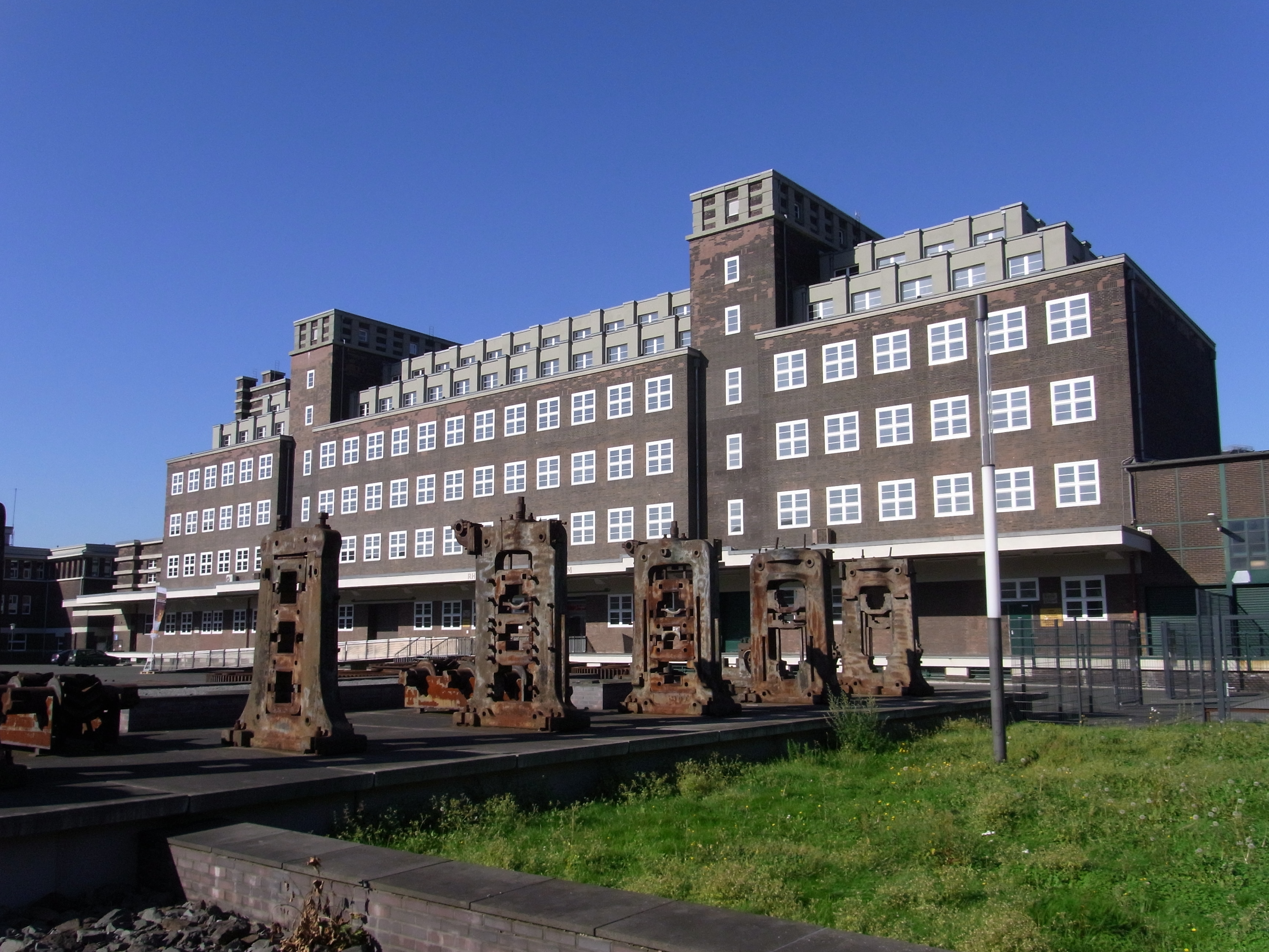 Lagerhaus der Gutehoffnungshütte in Oberhausen: Vorplatz